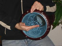 Darbuka im Gebrauch